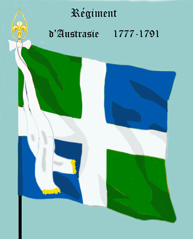 Ordonnanzfahne eines königlich französischen Infanterie-Regiments. - Entnommen und überarbeitet aus: „LES UNIFORMES ET LES DRAPEAUX DE L'ARMÉE DU ROI“ Marseille 1899. (Drapeau d'Ordonnance d' un régiment française d'infanterie royale.)